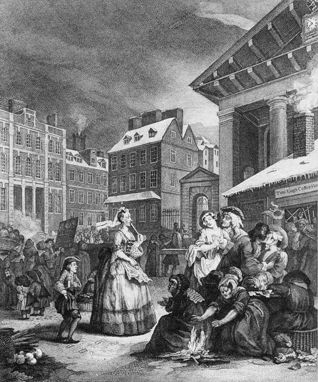 Scène hivernale. Place de marché entourée de hauts immeubles aux contours géométriques. À gauche un tas de légumes, à droite un café (d'après son enseigne) où les gens semblent se battre à coups de canne ; devant lui, un groupe composé d'une vieille mendiante qui tend la main, une femme qui tente de se réchauffer au-dessus d'un maigre feu de planches, deux couples : l'un s'embrasse, la jeune femme de l'autre est serrée de près par un homme en perruque (un juge ?) ; au centre, marchant vers la droite, une grande femme digne et raide, suivie d'un jeune garçon transi en habit (un serviteur ? il porte un livre et un vêtement plié sous le bras